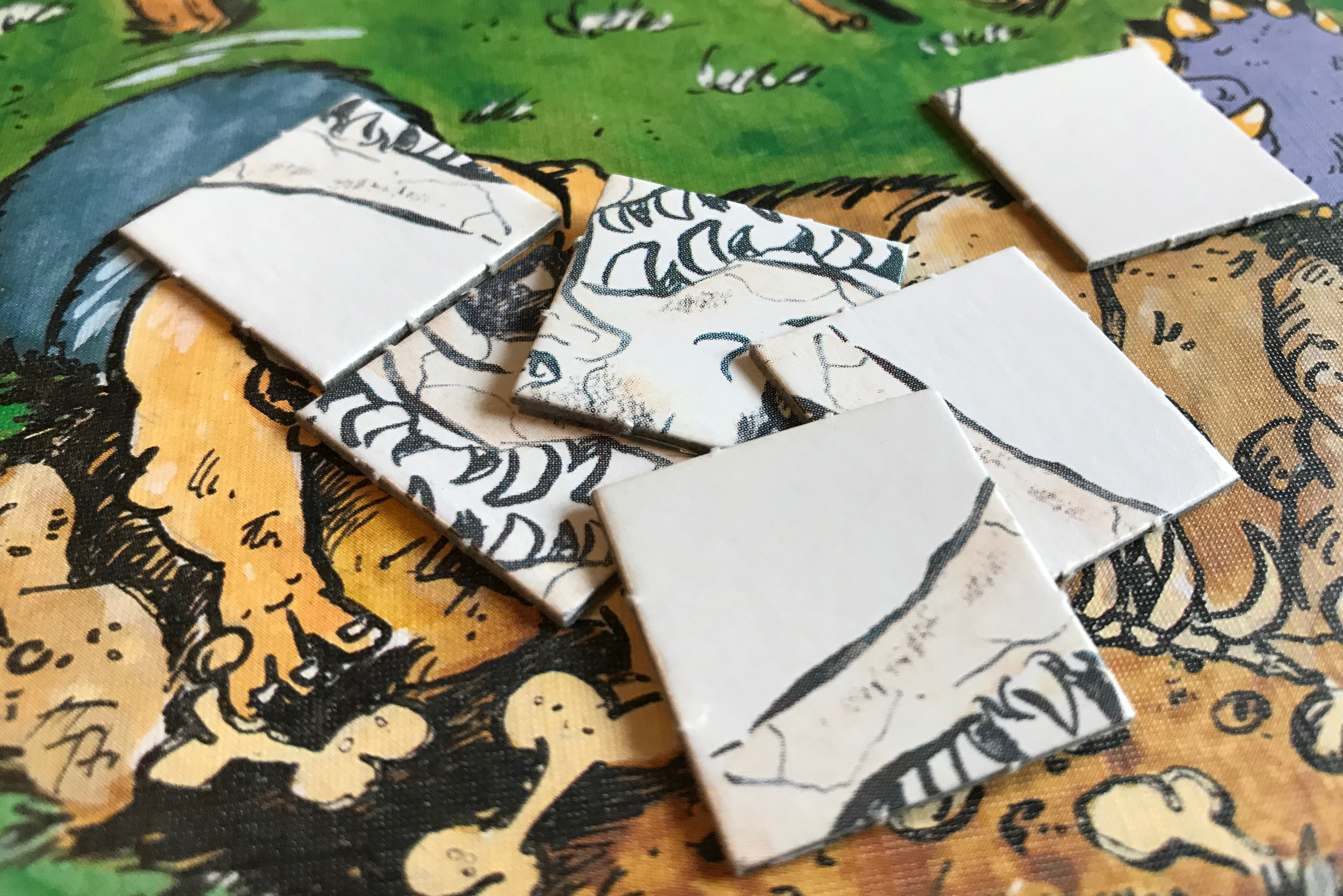 Spielmaterial von Neolithibum